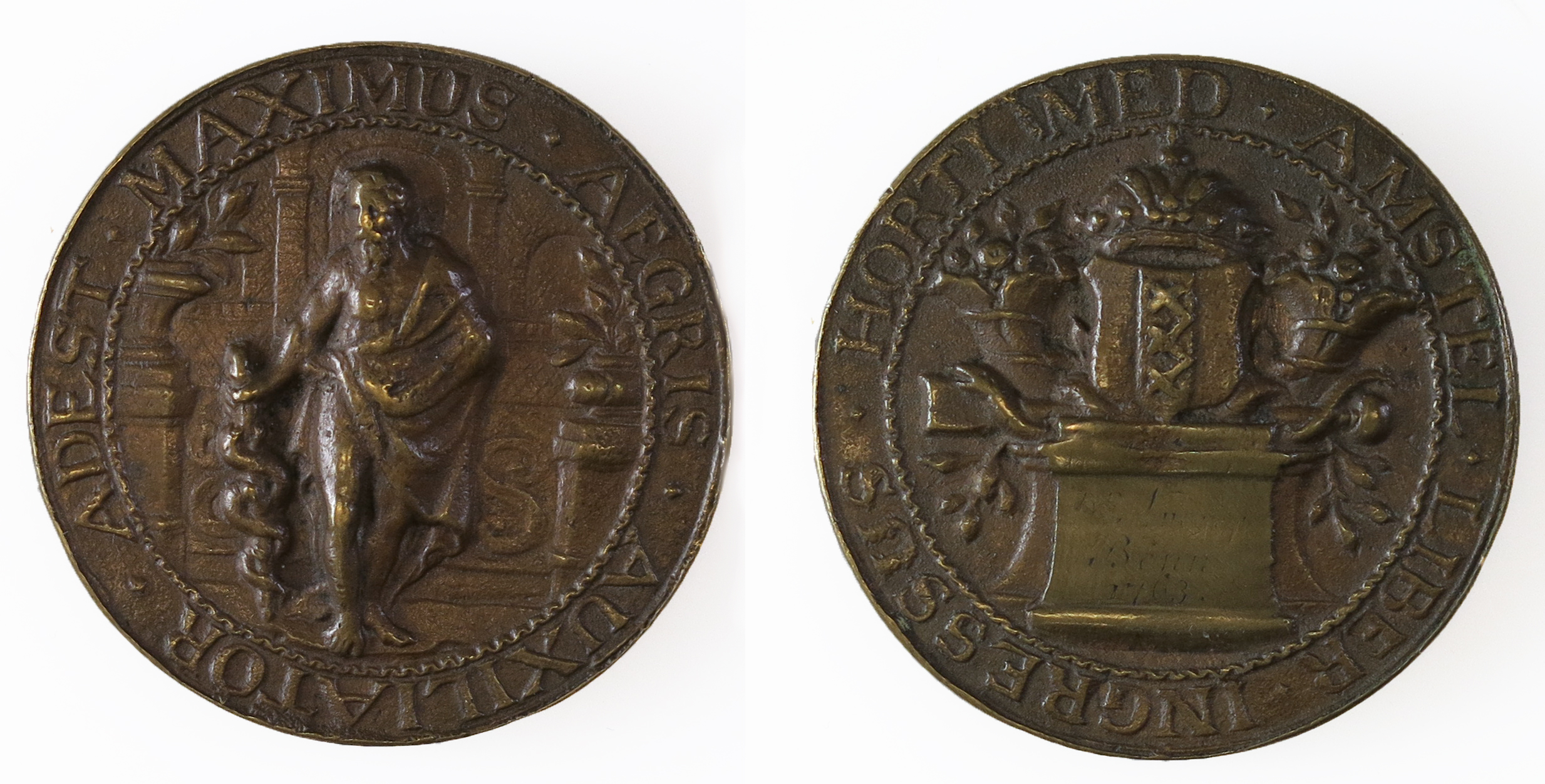 De eerste Amsterdamse Hortus Medicus (tuin met medicinale planten) werd in 1638 gesticht in de Reguliershof. Dit was een oud kloosterterrein dat destijds buiten de stad lag, op de plaats waar zich tegenwoordig de Utrechtsestraat en de Keizersgracht bevinden. Chirurgijns en apothekers gebruikten de kruiden om medicijnen van te maken, en konden in de Hortus de medicinale planten bestuderen. Dat was in deze tijd hard nodig, omdat de pest grote aantal slachtoffers eiste onder de bevolking. In 1682 verhuisde de Hortus naar de huidige locatie in de Plantage. Chirurgijns en apothekers hadden een toegangspenning nodig om hier naar binnen te mogen. Deze toegangspenning was van arts en chirurg Andreas Bonn (1738-1817), die zich in 1764 als geneesheer in Amsterdam vestigde. In 1771 werd hij benoemd tot hoogleraar in de ontleed- en heelkunde aan het Athenaeum Illustre. De Amsterdamse Andreas Bonnstraat is naar hem vernoemd.